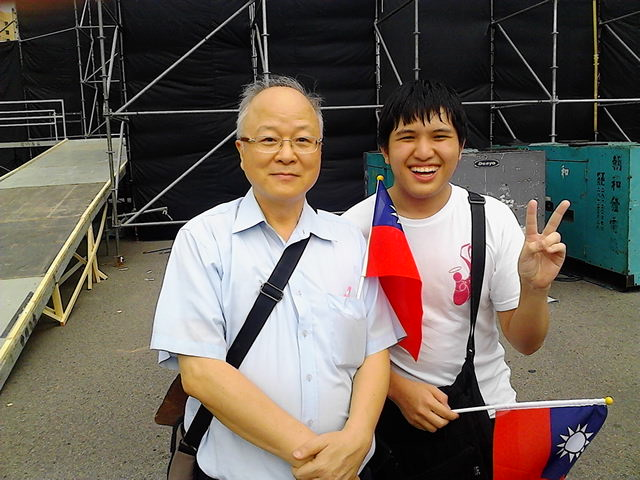 我和郭冠英在新五四運動合照